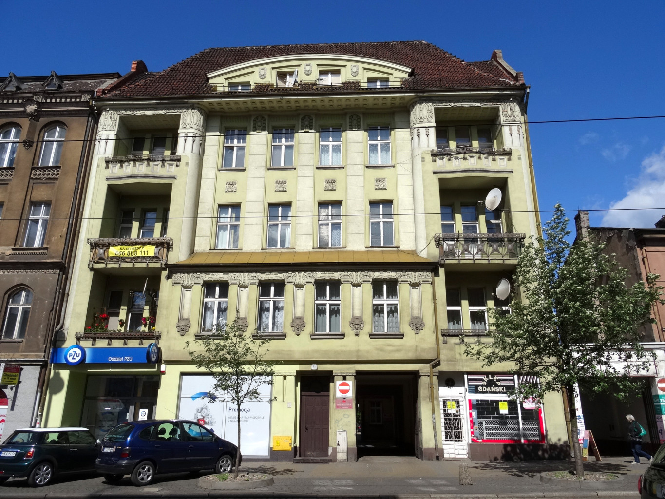 Kamienica przy ul. Gdańskiej 71 w Bydgoszczy (1906-1908)